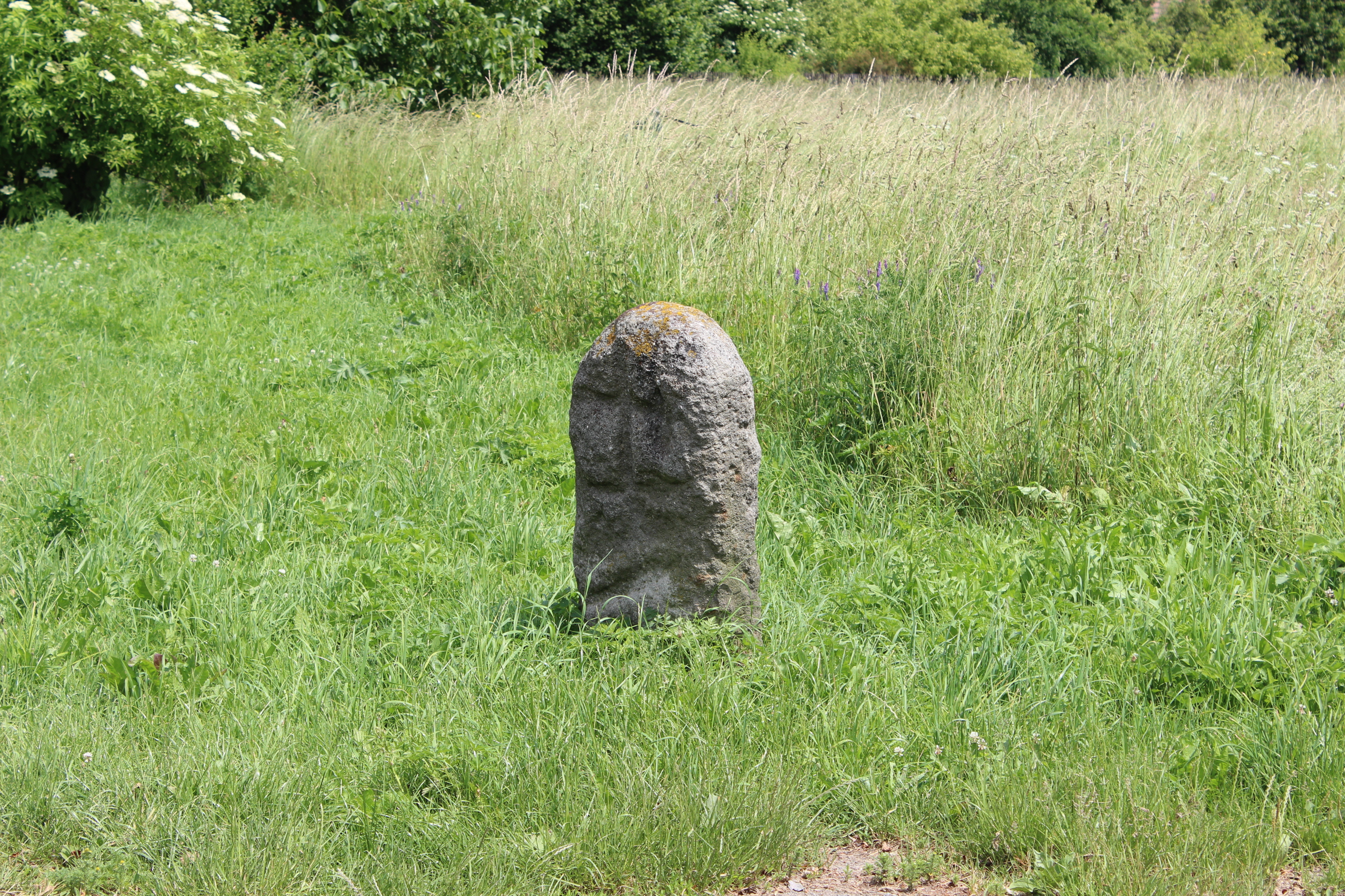 Smírčí kříž u fotbalového hřiště v Bratronicích v kladenském okrese.